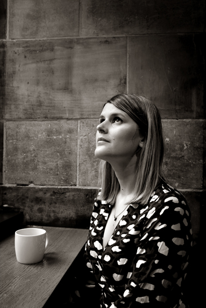 Laura Jassens